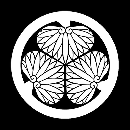 「三葉葵」紋（染抜）